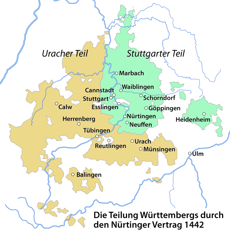 Die Teilung Württembergs durch den Nürtinger Vertrag 1442 (Karte)